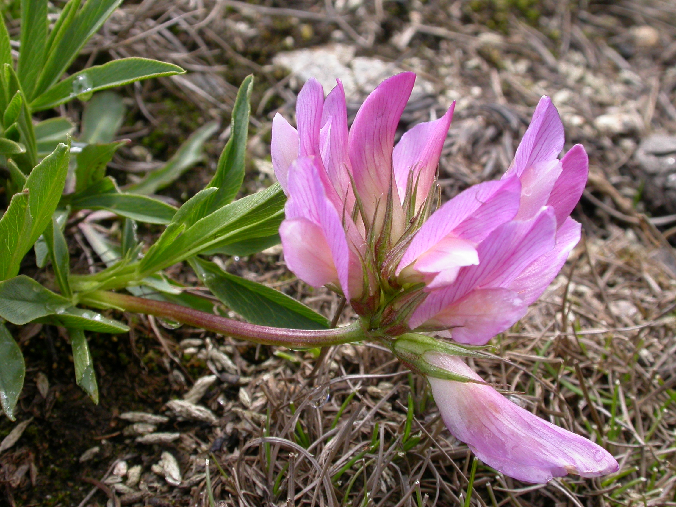 Trifolium alpinum Zermatt, Riffelberg (Kanton Wallis, Switzerland), 2500 m Author: Barbara Studer – own photograph Date: 2.08.06